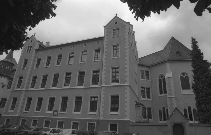 29.9.1987 Einweihung des neuen Seminargebäudes der Bundesakademie für öffentliche Verwaltung des Bundesministeriums des Innern durch Staatssekretär Franz Kroppenstedt (Bundesminister des Innern), dem Präsidenten der Bundesakademie, Alfred Dimpker und dem Minister des Innern und für Sport des Landes Rheinland-Pfalz, Rudi Geil, in Boppard.